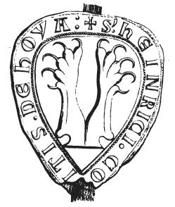 Siegel des Grafen Heinrich II. von Hoya († 1290)